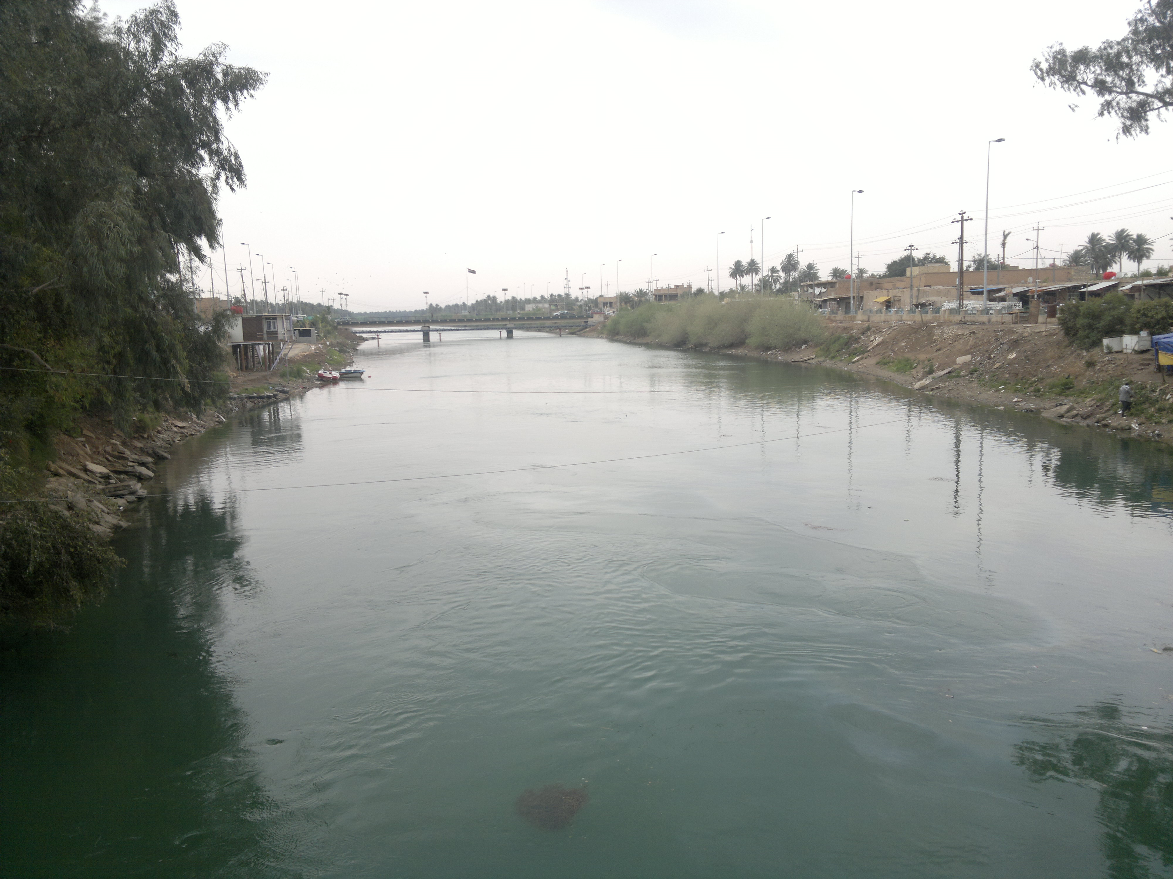 صور من محافظة الديوانية